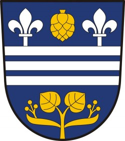 Nosálov